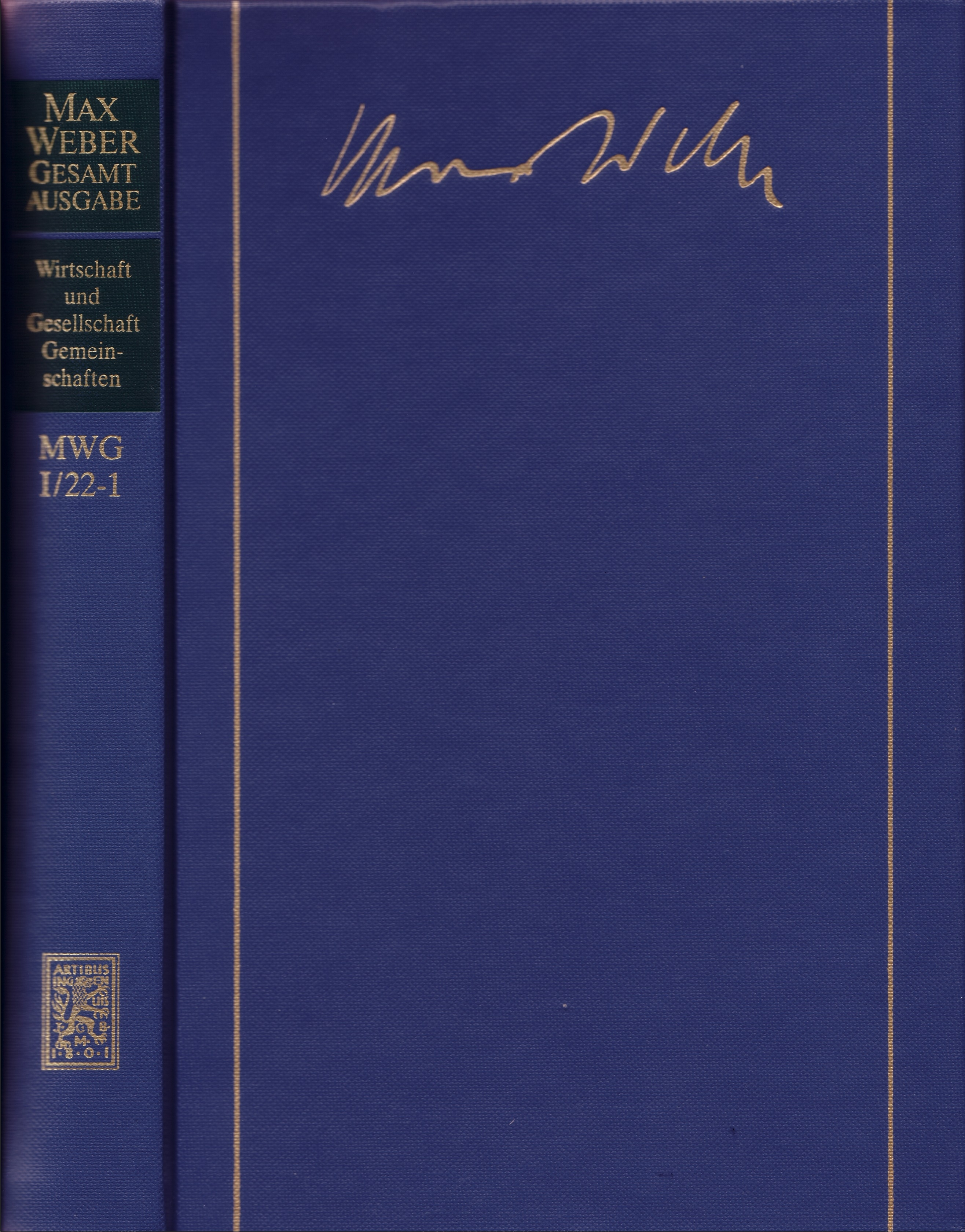 Scan des Buchrückens und -deckels des Bandes I/22-1 der Max Weber-Gesamtausgabe (MWG) "Wirtschaft und Gesellschaft. Gemeinschaften" mit aufgeprägtem Namenszug Max Webers